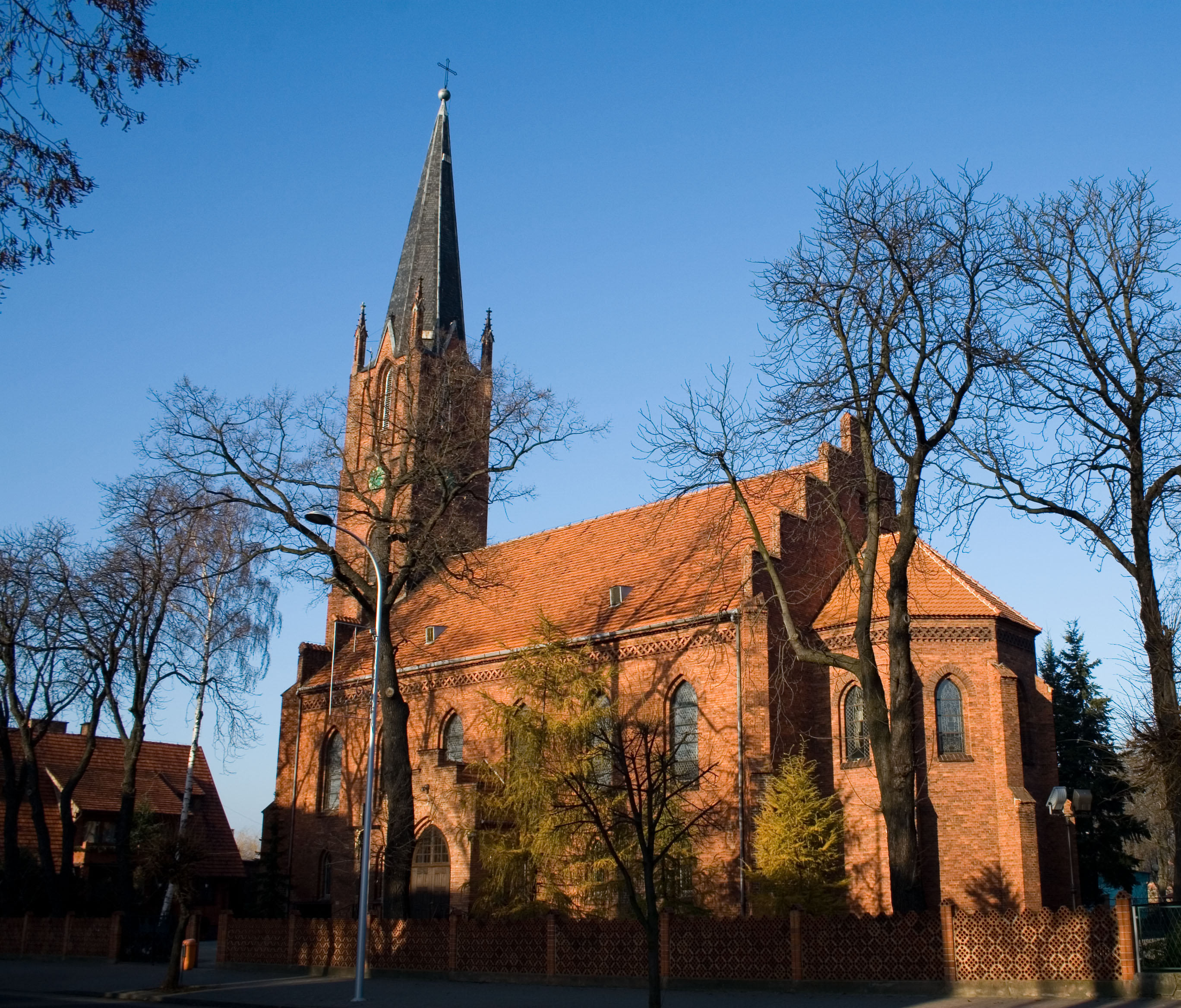 Kościół pw. Chrystusa Króla w Ostrzeszowie (zabytek nr rejestr. 732/Wlkp/A)